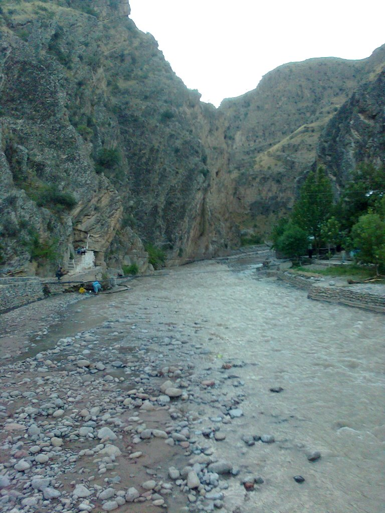 Хужайпок Маскани - это достопримечательность Южной части Узбекистана (Сурхандарьинская область) у подножьях гор и целебным источником. Река Худжайпока.